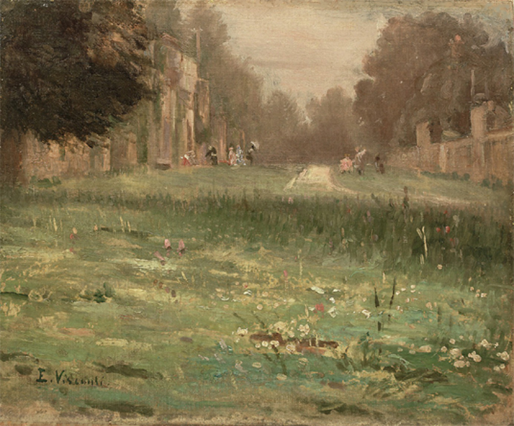 Obra do Projeto Eliseu Visconti